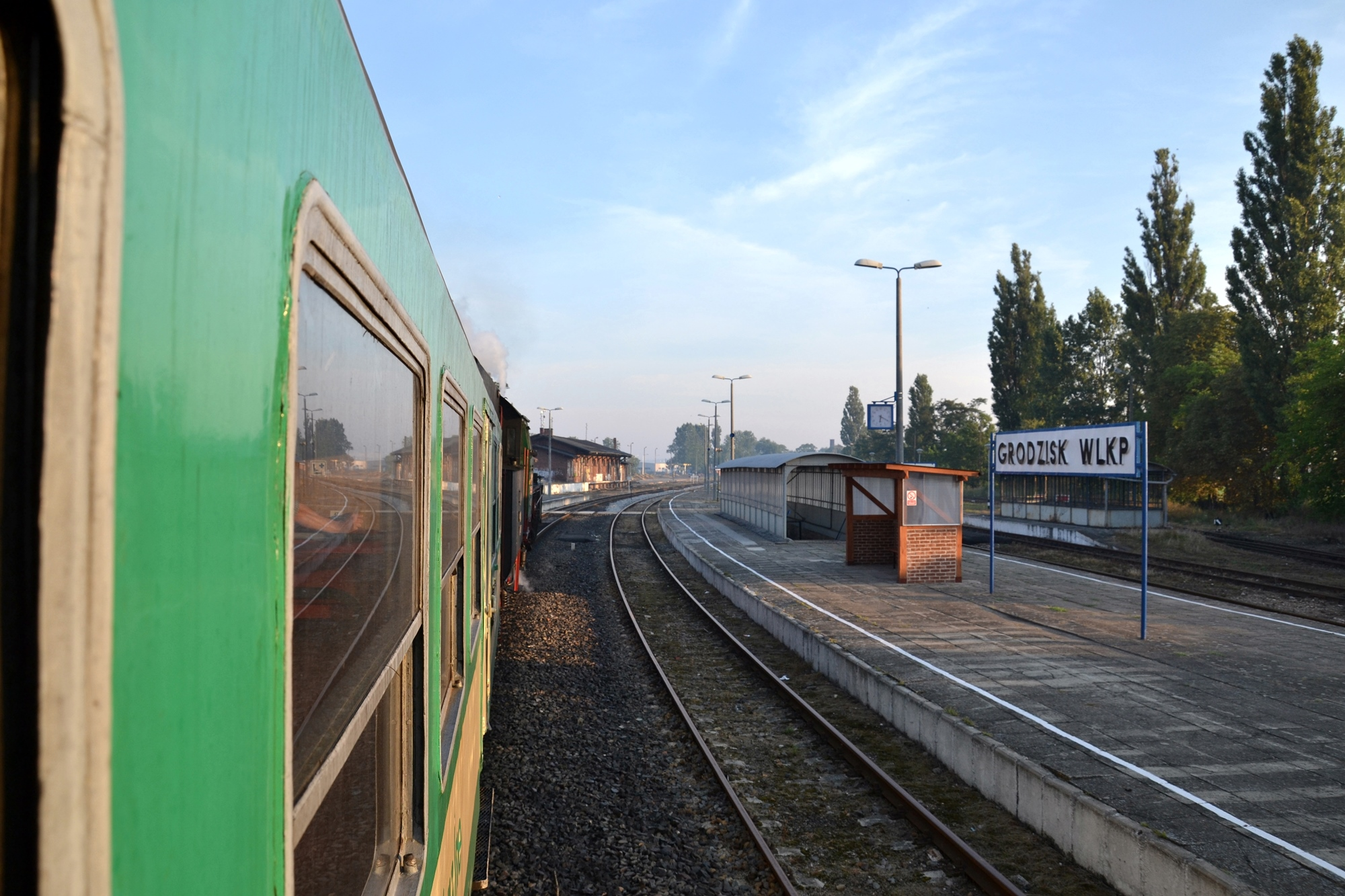 OL49-59 z porannym pociągiem osobowym Kolei Wielkopolskich z Wolsztyna do Poznania na stacji w Grodzisku Wielkopolskim